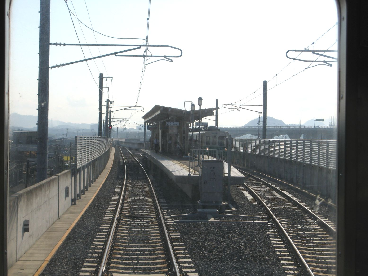 高架化された水田駅 車内から長尾方を望む